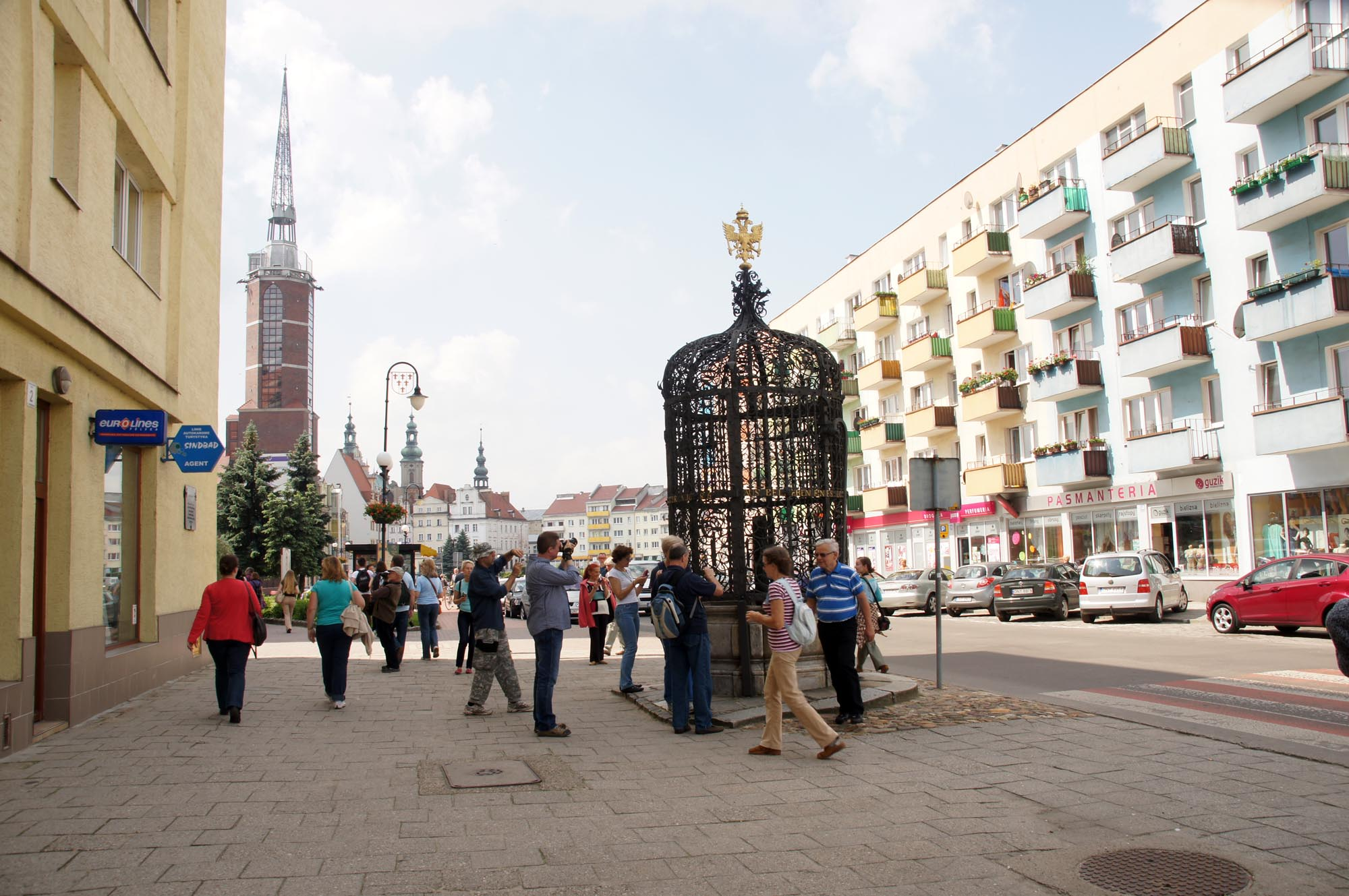 Nysa, Stare Miasto